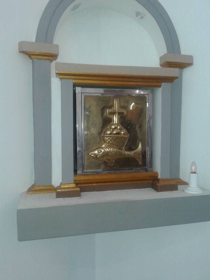 Igreja de Santa Cruz Maliana